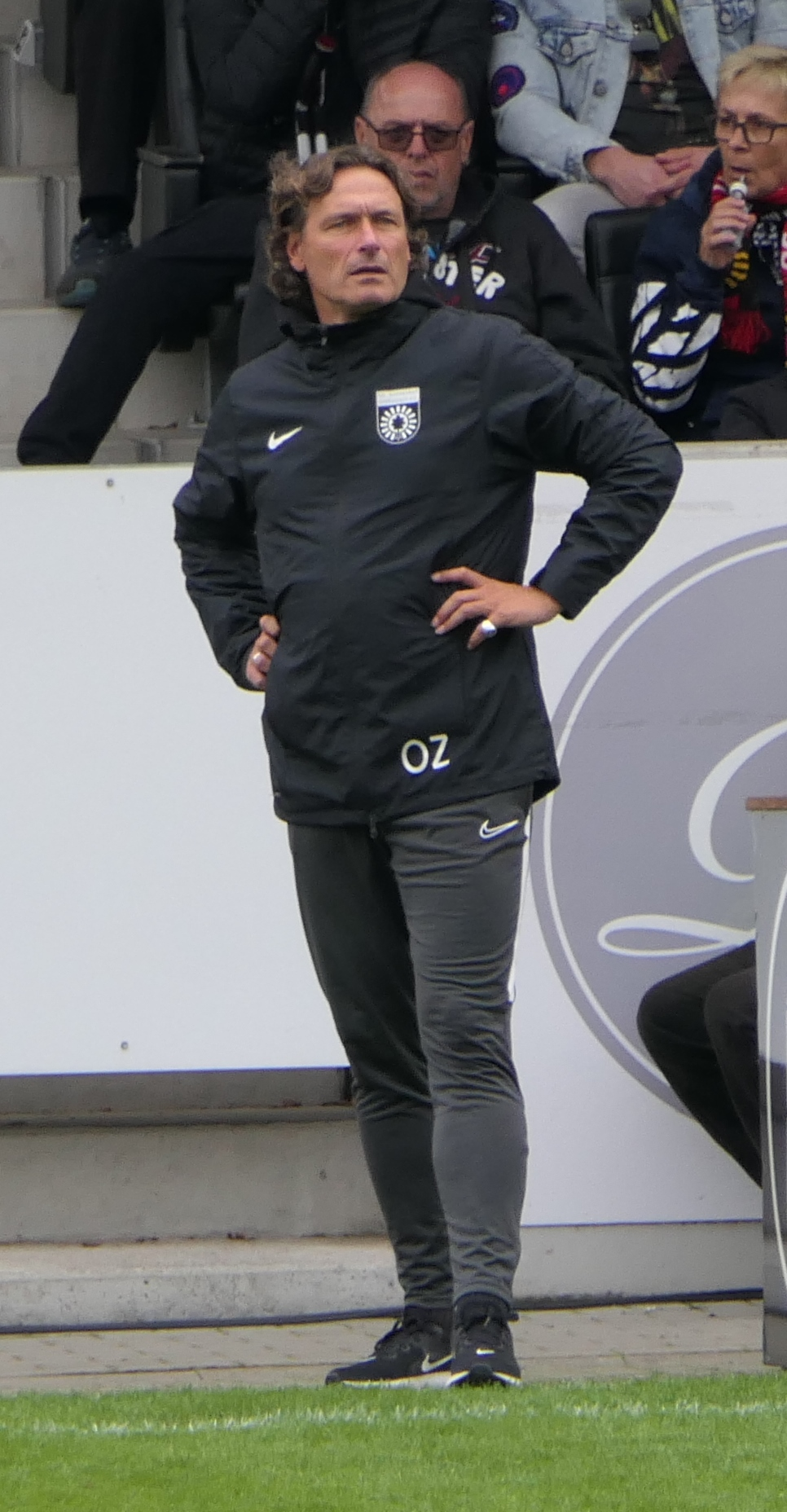 Der Fussballtrainer Oliver Zapel an der Seitenlinie des SG Sonnenhof Großaspach beim Heimspiel gegen Eintracht Braunschweig am 27.10.2019.